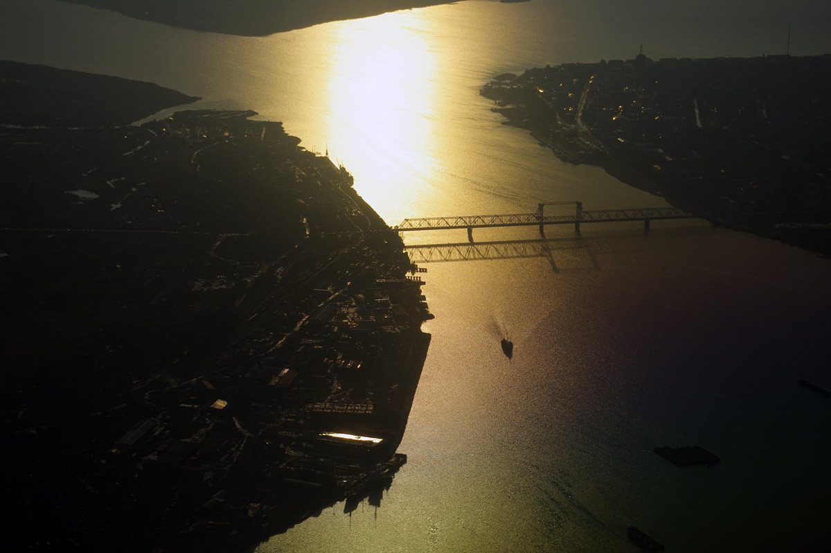 вид на северную двину, старый мост, и Архангельск с борта заходящего на посадку самолета